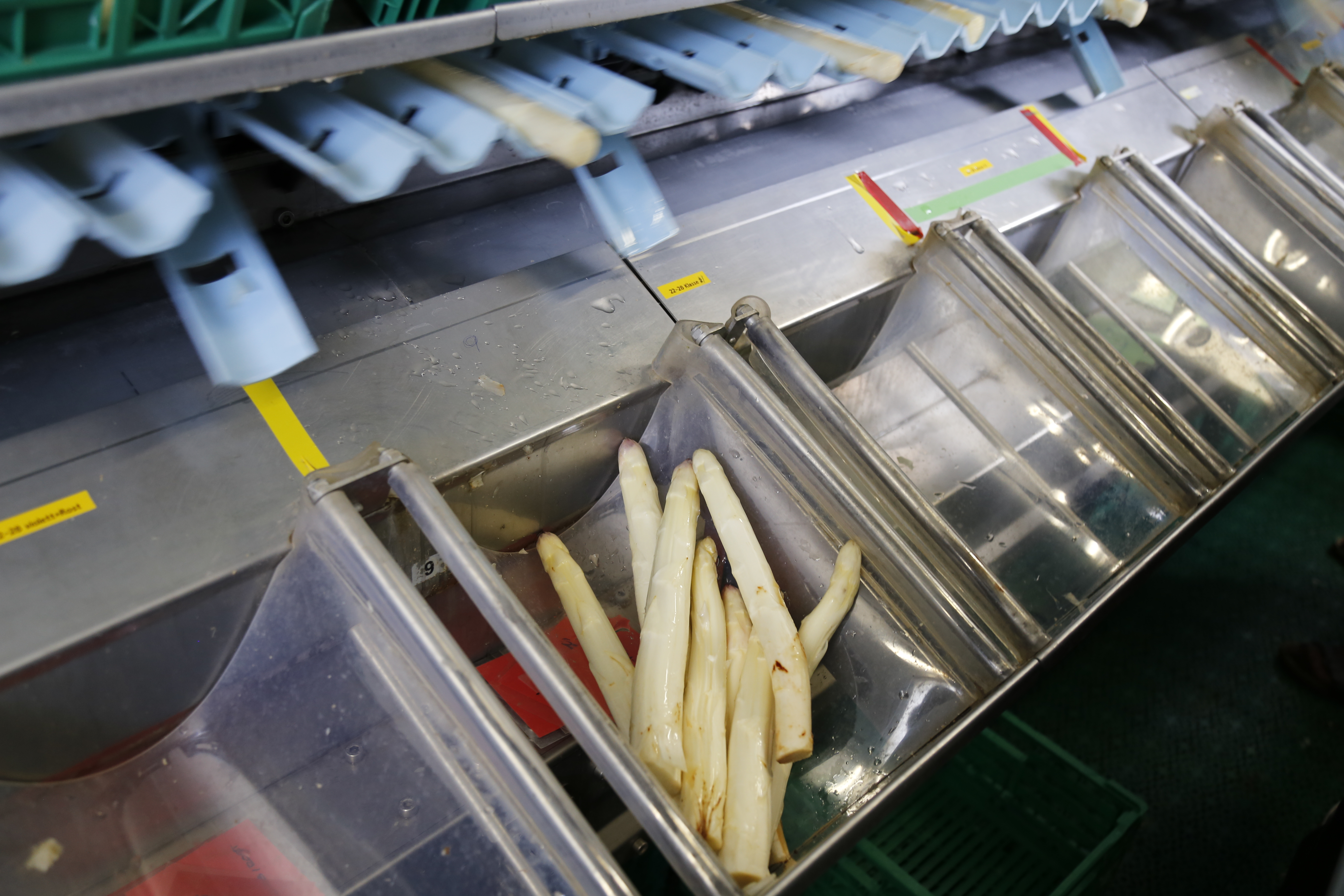 Teilansicht einer vollautomatischen Spargelsortiermaschine. Die einzelnen Spargelstangen werden mithilfe von Mess- und Verwiegeverfahren nach Dicke und Länge sortiert und anschließend in mehrere getrennte Ablagen geführt (siehe Bild). Von dort werden sie manuell in Kästen abgelegt.